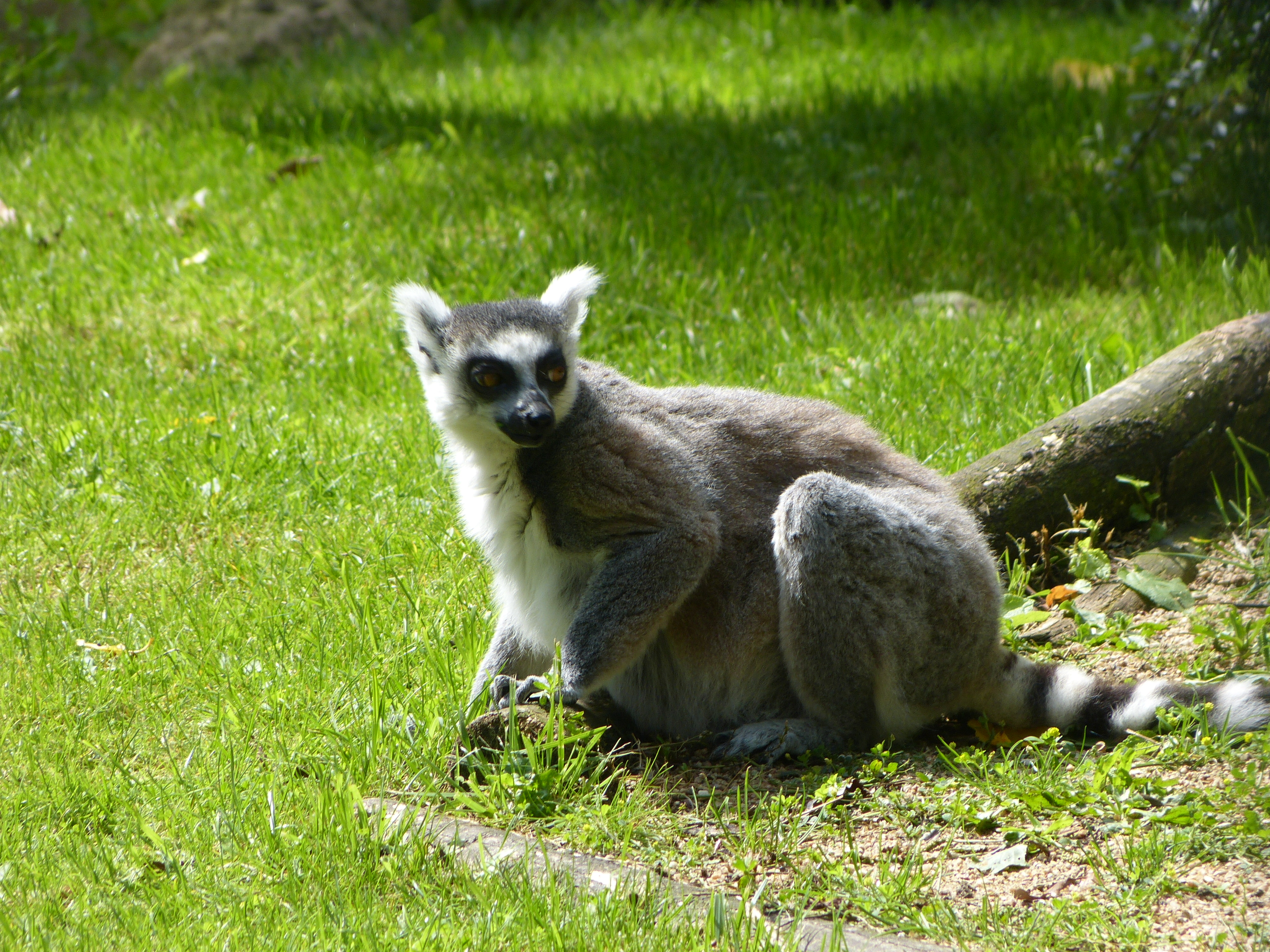 Photo prise au zoo de Beauval en France